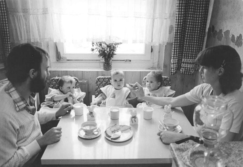 Leipzig, Familienszene ADN-ZB Grubitzsch 7.8.84 Leipzig: Kinderreich ist das Studentenpaar Reichel - Sylke und Wolfhard studieren Medizin an der Leipziger Karl-Marx-Universität. Am 27.5.83 wurden ihre Drillinge Barbara, Franziska und Friederike geboren. Die junge Familie wohnt in einer Dreiraum-Neubauwohnung in Leipzig-Grünau, für die nur 12 M Miete bezahlt werden müssen. Die junge Mutter setzte ein Jahr mit dem Studium aus und wurde in dieser Zeit vom stellvertretenden Direktor der Frauenklinik Prof. Karl-Eugen Ruckhäberle betreut. Er ist ihr Mentor für die Diplomarbeit, die sie im 3. Studienjahr abschließen will. Ihr Staatsexamen Anatomie hat Sylke Reichel mit "Gut" bestanden. Ab September wird mit ihr ein Fördervertrag abgeschlossen. Außerdem hat sie bereits jetzt einen gestaffelten Prüfungsplan. Für die Kinder wurden dem Ehepaar eine Hauswirtschaftshilfe von der Volkssolidarität zur Verfügung gestellt, die drei Jahre lang von der Volkssolidarität und von der Universität bezahlt wird. Als kinderreiche Familie erhalten die Reichels für jedes Kind einen Zuschuß von 50.- M von der Universität zum staatlichen Kindergeld und 175.- M Sozialunterstützung zum Stipendium. Außerdem erhalten sie wie die anderen kinderreichen Familien 300.- M Unterstützung im Jahr und können gesonderte Einkaufsmöglichkeiten in Anspruch nehmen. (siehe auch 16 und 18N)